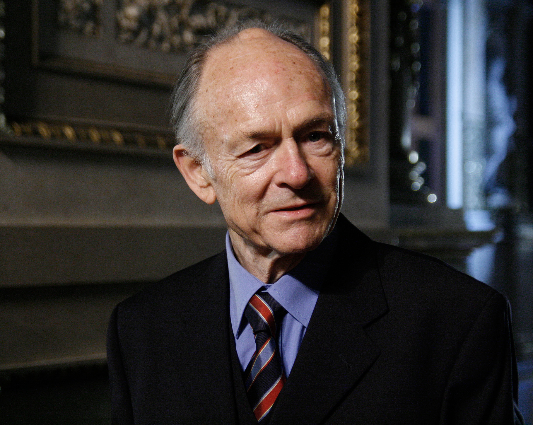 Joachim Bißmeier zu Gast bei der Verleihung des Nestroy-Theaterpreises 2010 im Burgtheater in Wien.